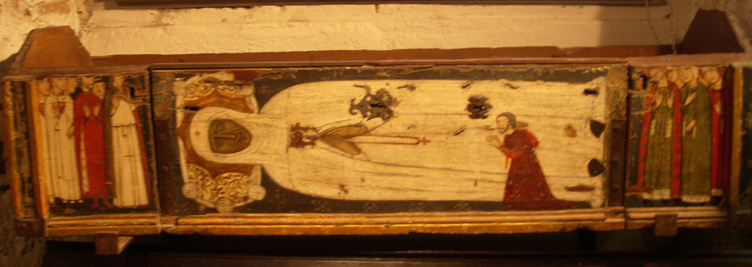 Antic sepulcre de Santa Maria de Cervelló, amb el retrat de la santa i Pere el Cerimoniós agenollat, pintat al s. XIV. Era a la Basílica de la Mercè, de Barcelona i actualment és al Museu Diocesà de Barcelona.